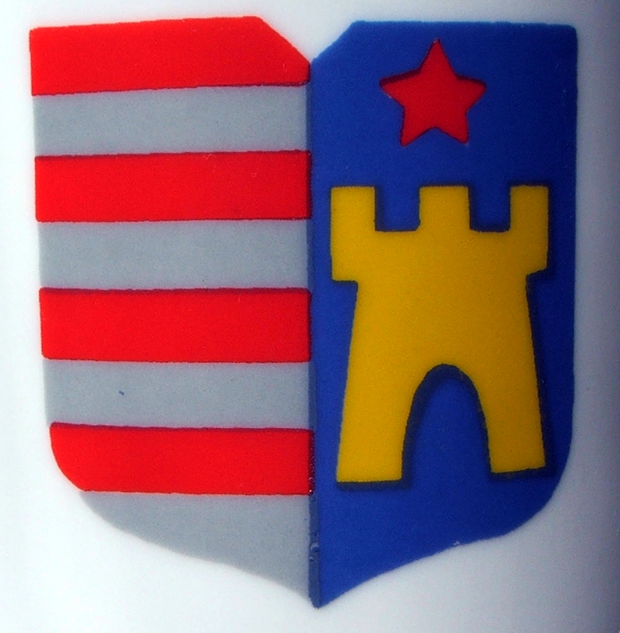 Tata insignia in 1970-1989